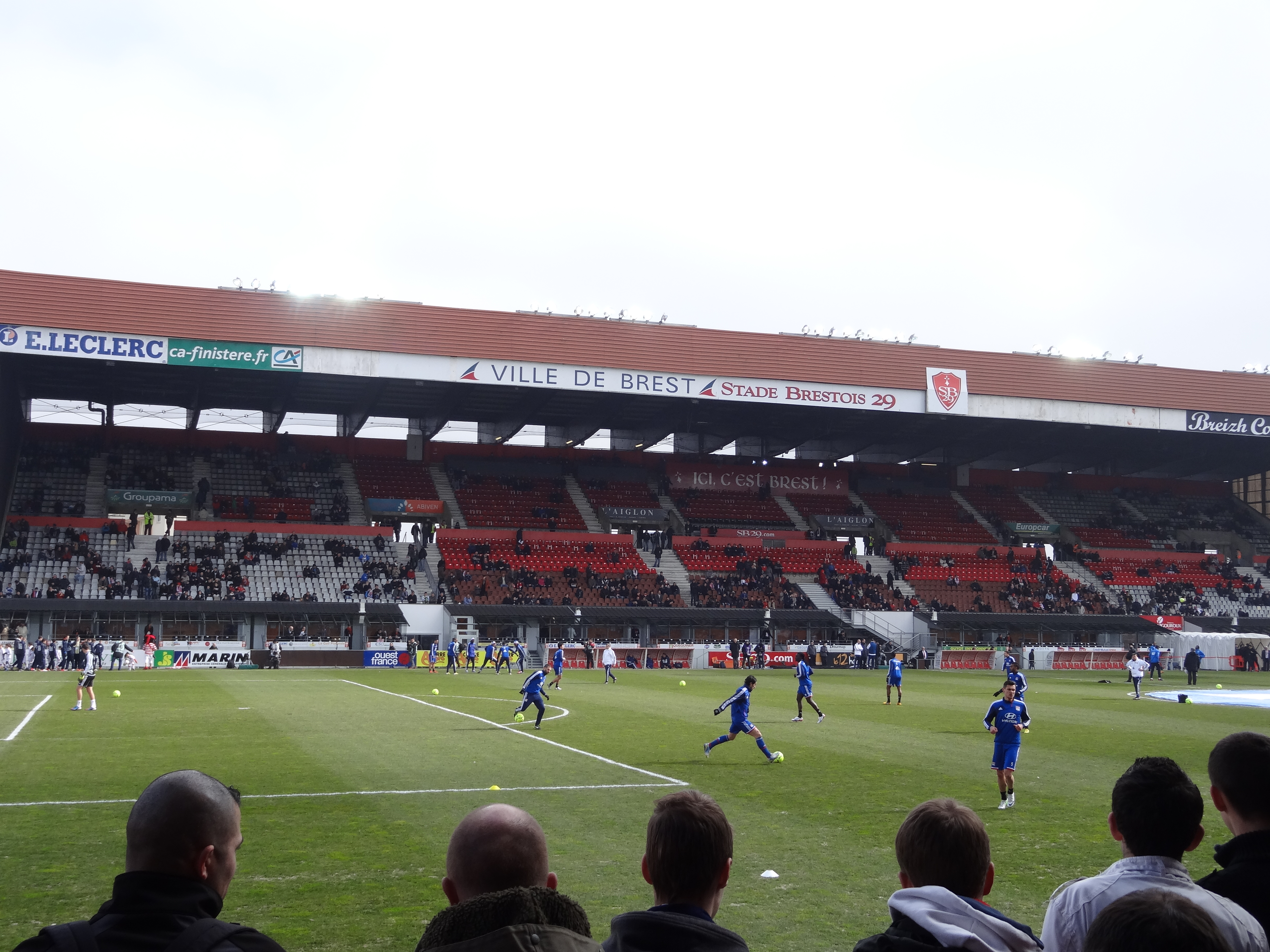 Match de football (Ligue 1) entre le Stade brestois 29 et l'Olympique lyonnais, le 3 mars 2013